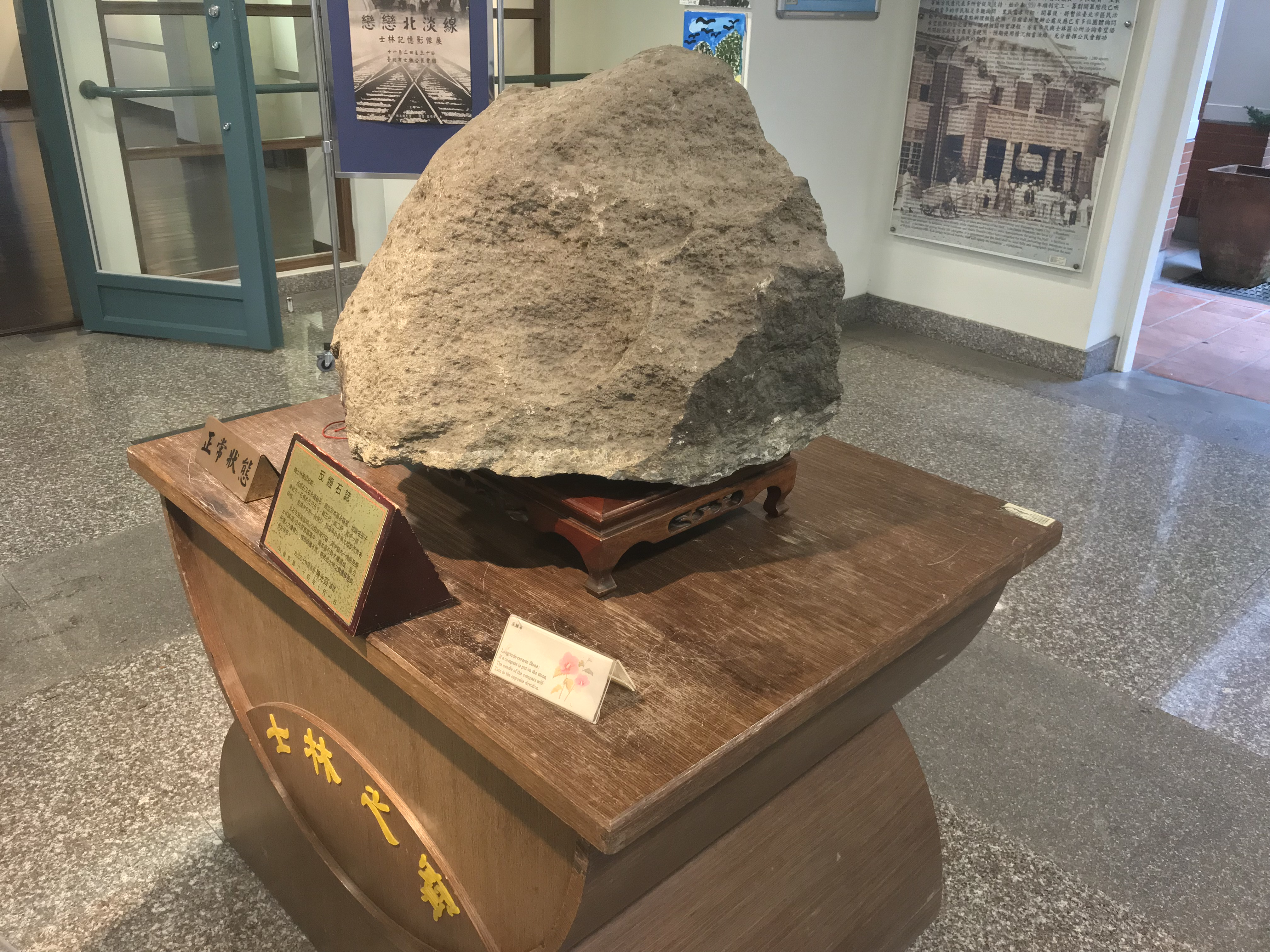 中文（台灣）: 士林公民會館永福磁石